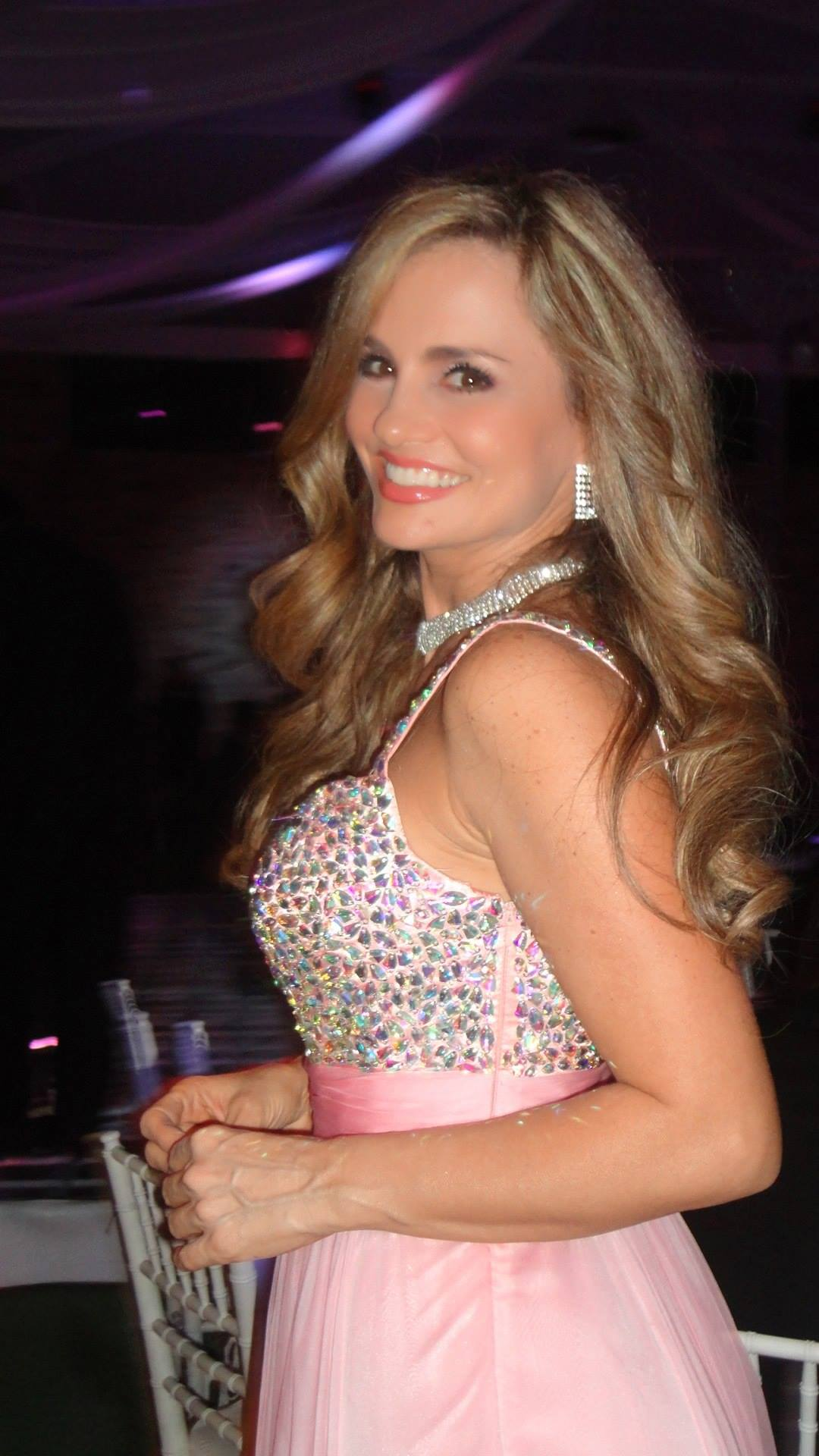 Palmas de Oro 2014 - Mexico DF